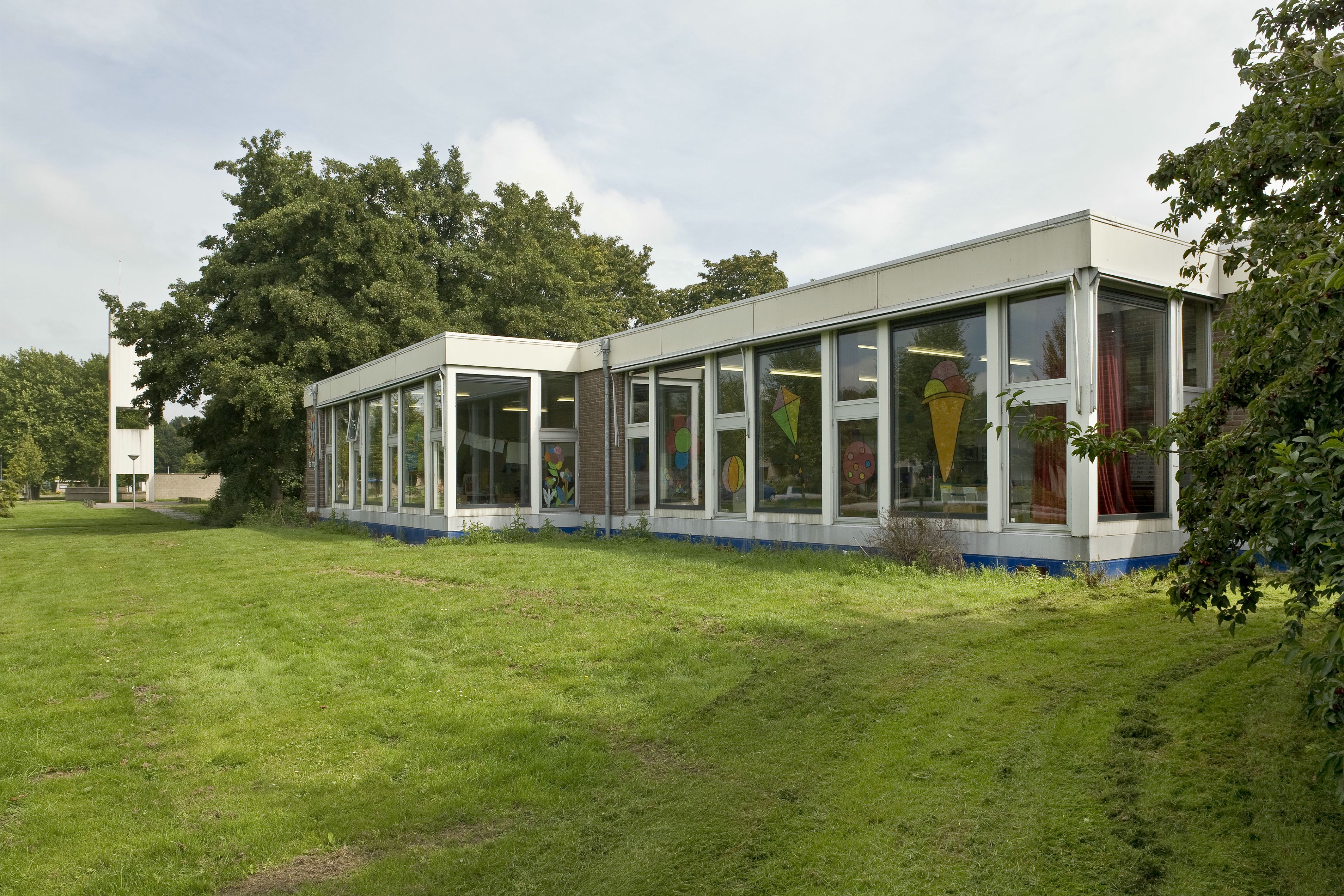 Openbare School De Ringloop: Overzicht van de achterzijde (opmerking: Gefotografeerd voor Monumenten van Herrezen Nederland)